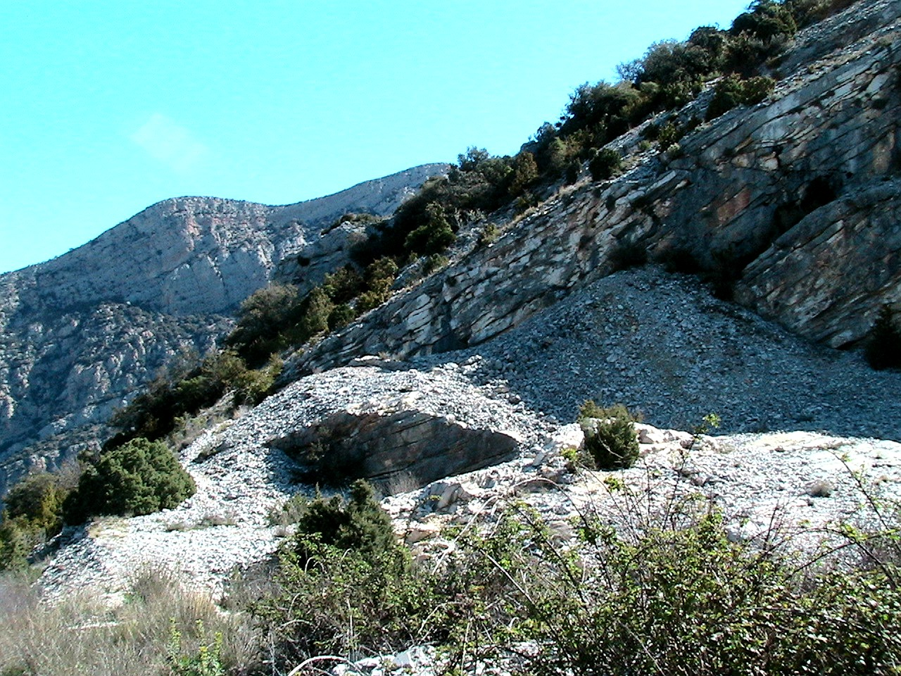 La Pedrera de Meà, al Montsec de Rúbies (Noguera) This is a a photo of a paleontological site in Catalonia, Spain, with id: IPAPC-12430